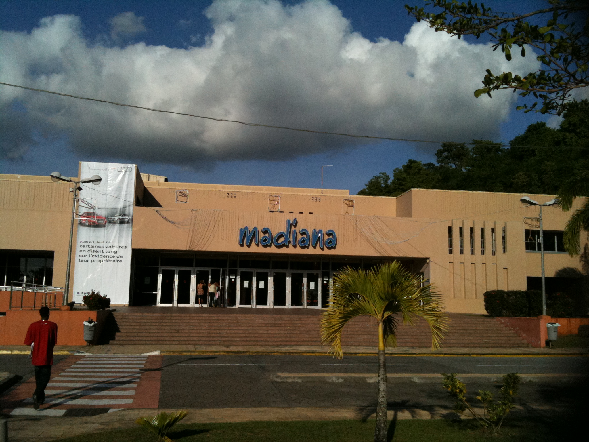 Palais des congrès salles de cinéma de Madiana, Schoelcher, Schœlcher, Martinique